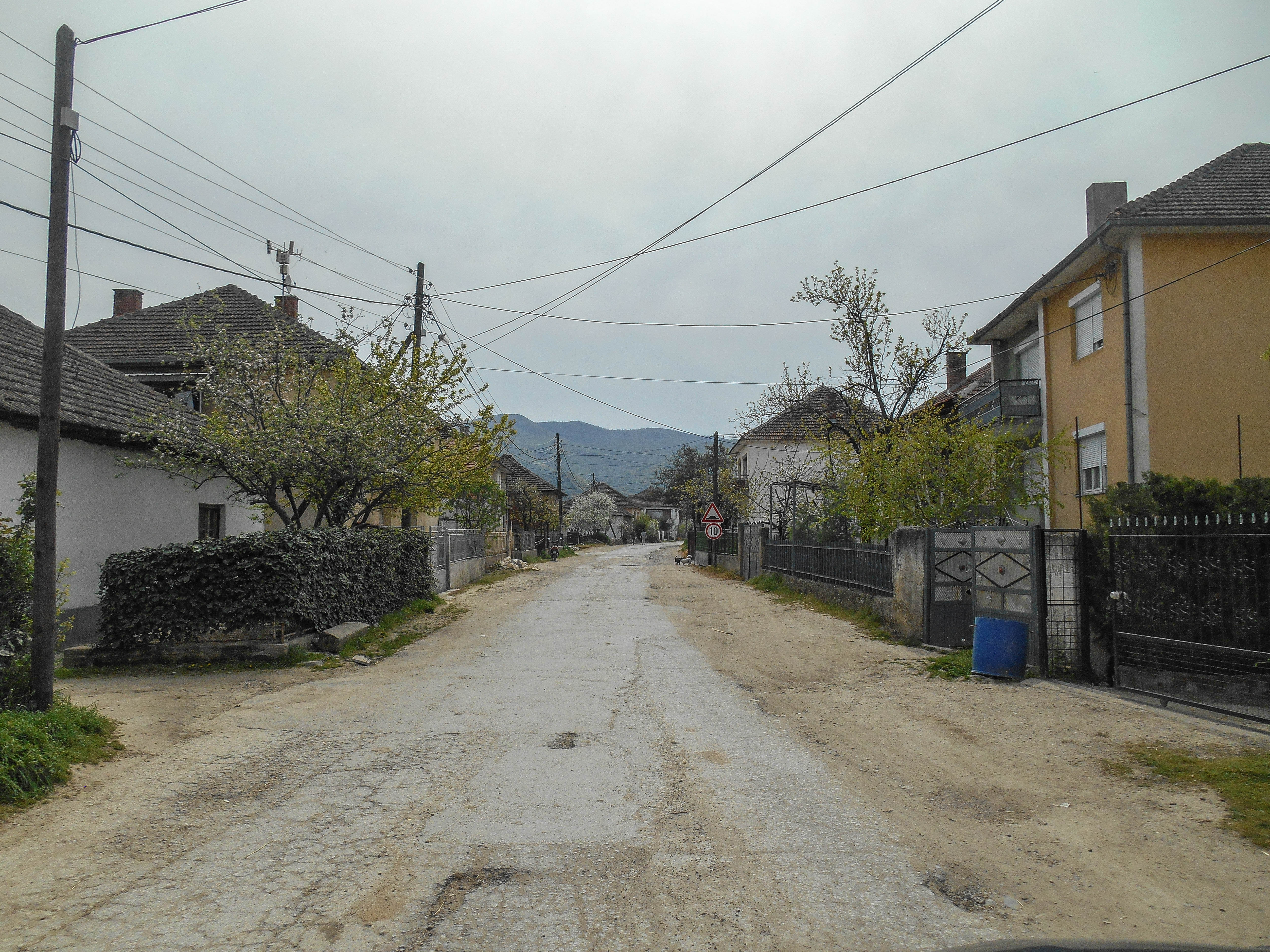 Улица во селото